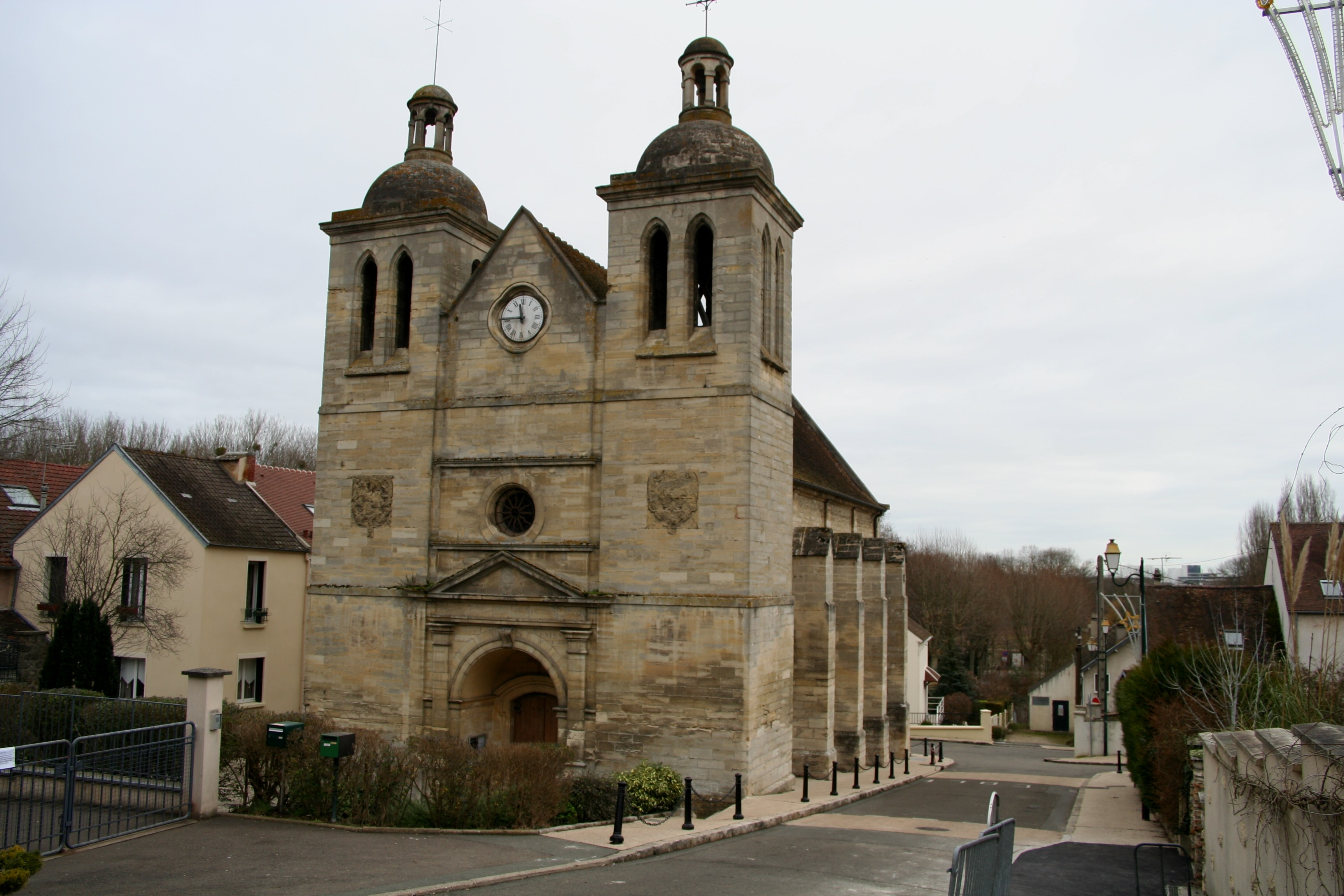 Église de Médan - Yvelines (France).